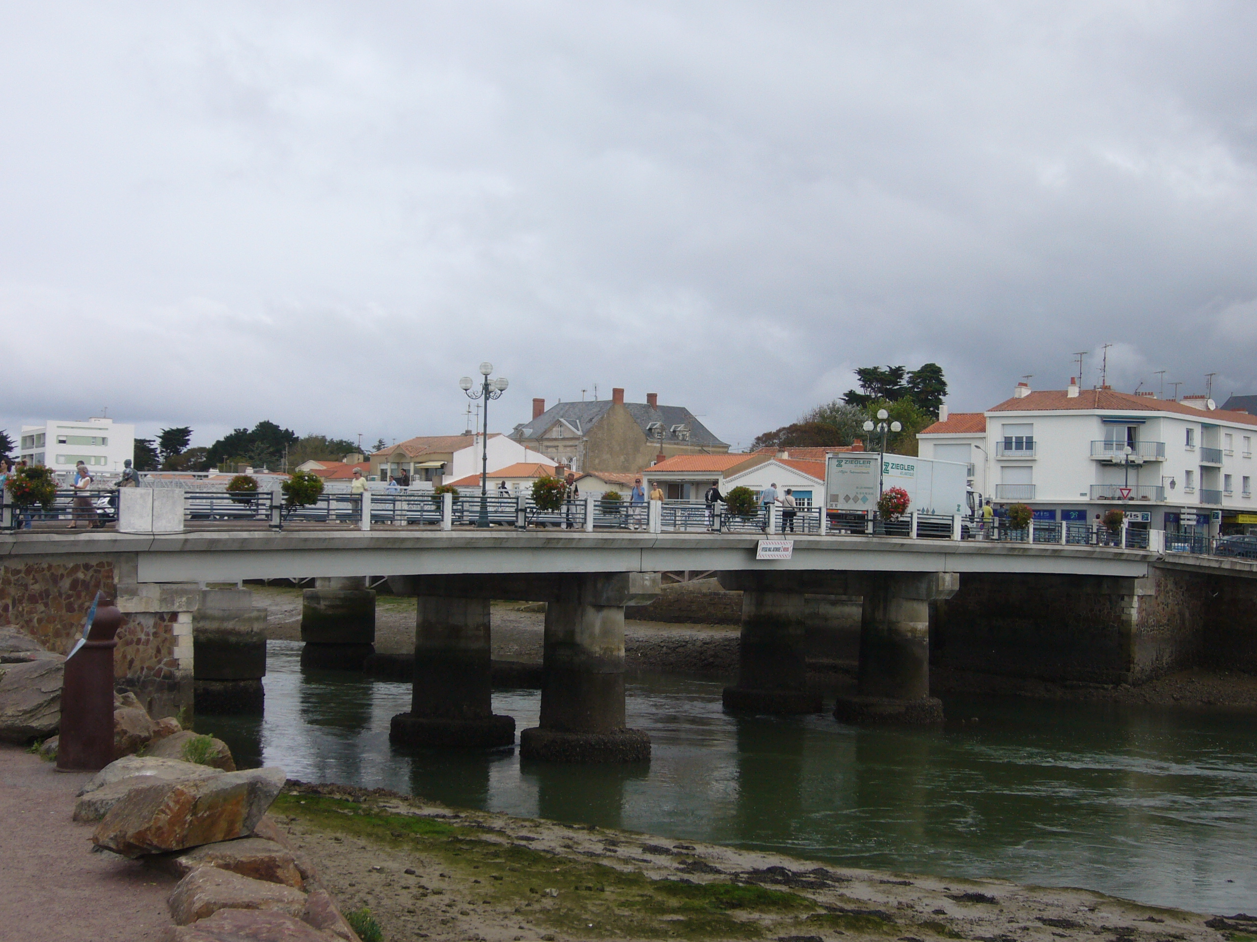 Saint-Gilles-Croix-de-Vie dans le département de la Vendée (France) : Le pont de la Concorde sur le fleuve de la Vie.